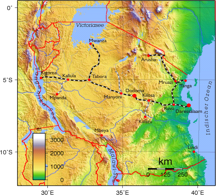 Tanzania railways lines